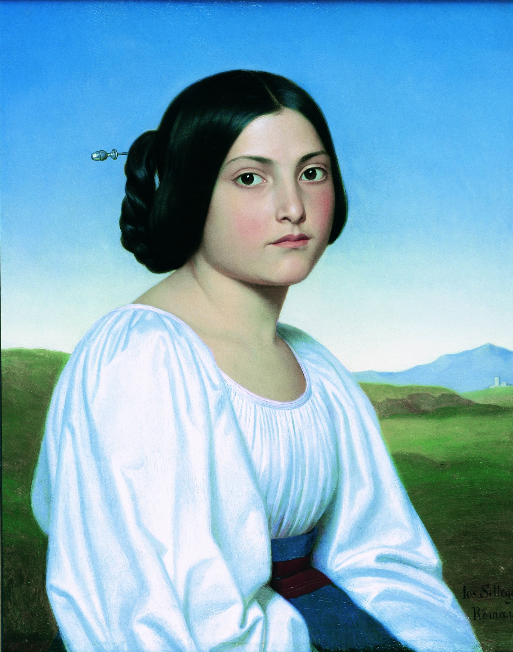 Bildnis der Vittoria Caldoni